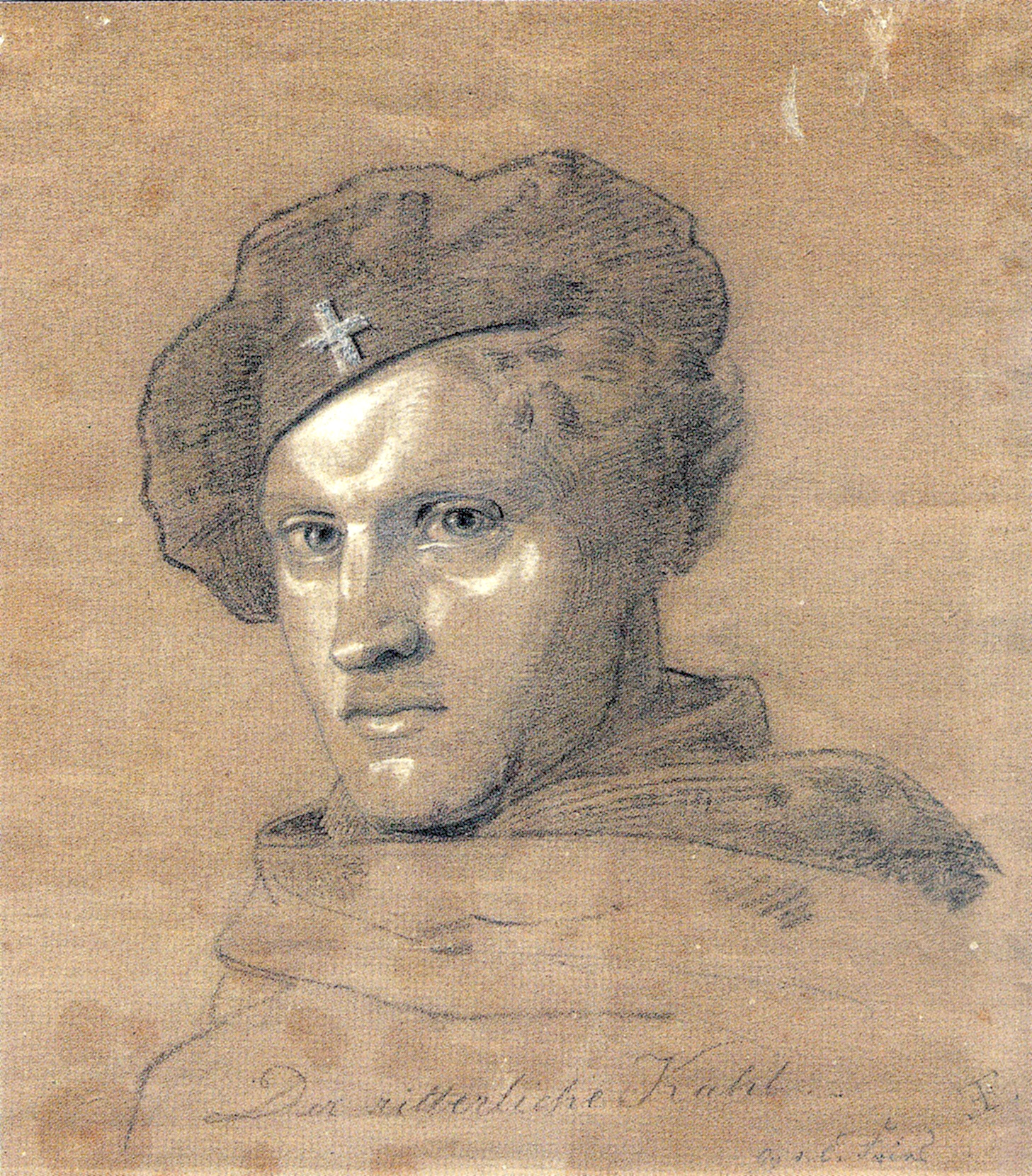 "Der ritterliche Kahl", Zeichnung vermutlich von Ernst Fries aus dem Jahre 1819, dargestellt ist Jacob Carl Kahl, Burschenschafter aus Darmstadt, Heidelberg und Gießen, Mitglied der "Gießener Schwarzen" in deren Tracht mit schwarzem Barett und silbernem Kreuz, Rechte abgelaufen, Public Domain